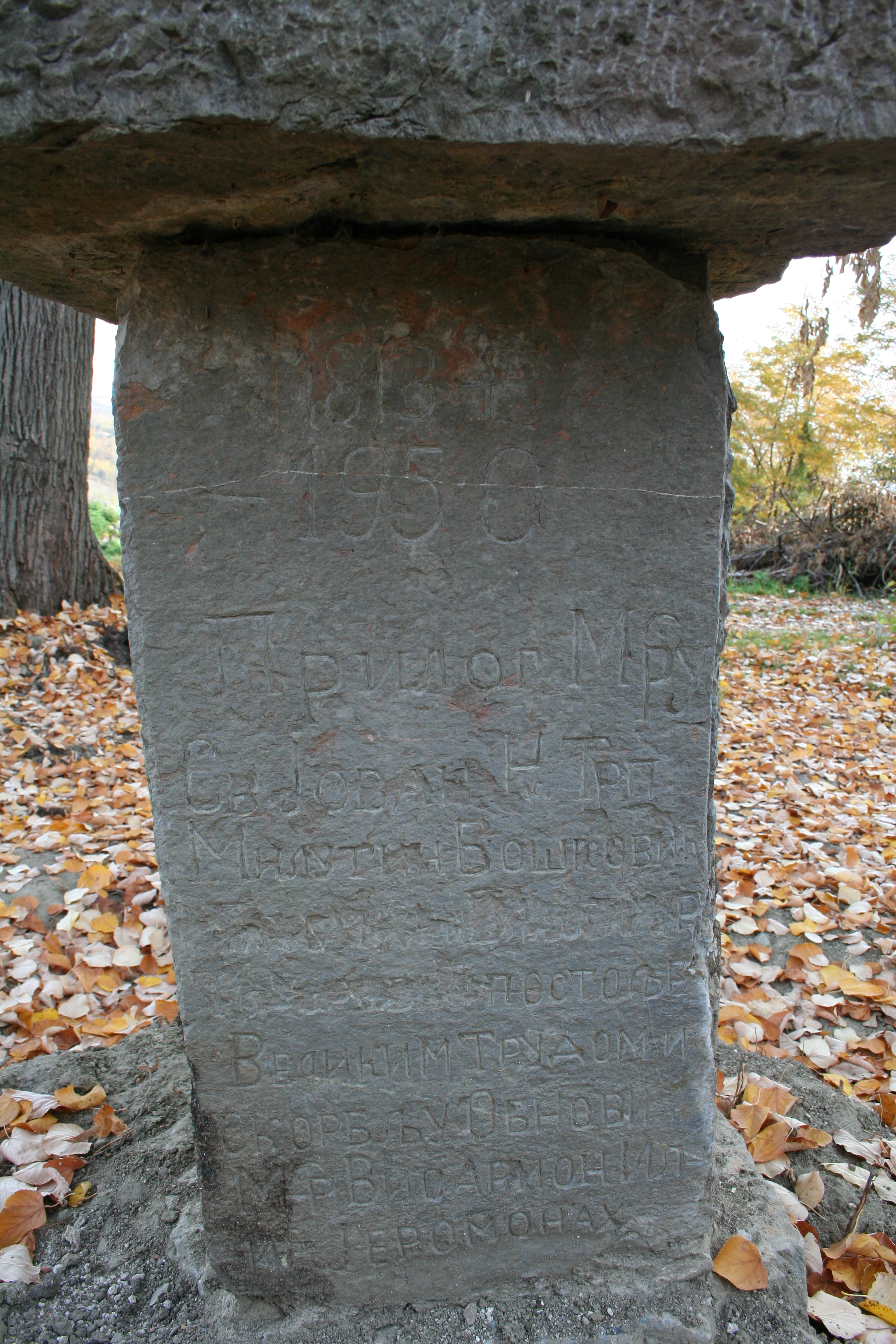 Ruševine manastira Grad (Gradojević)